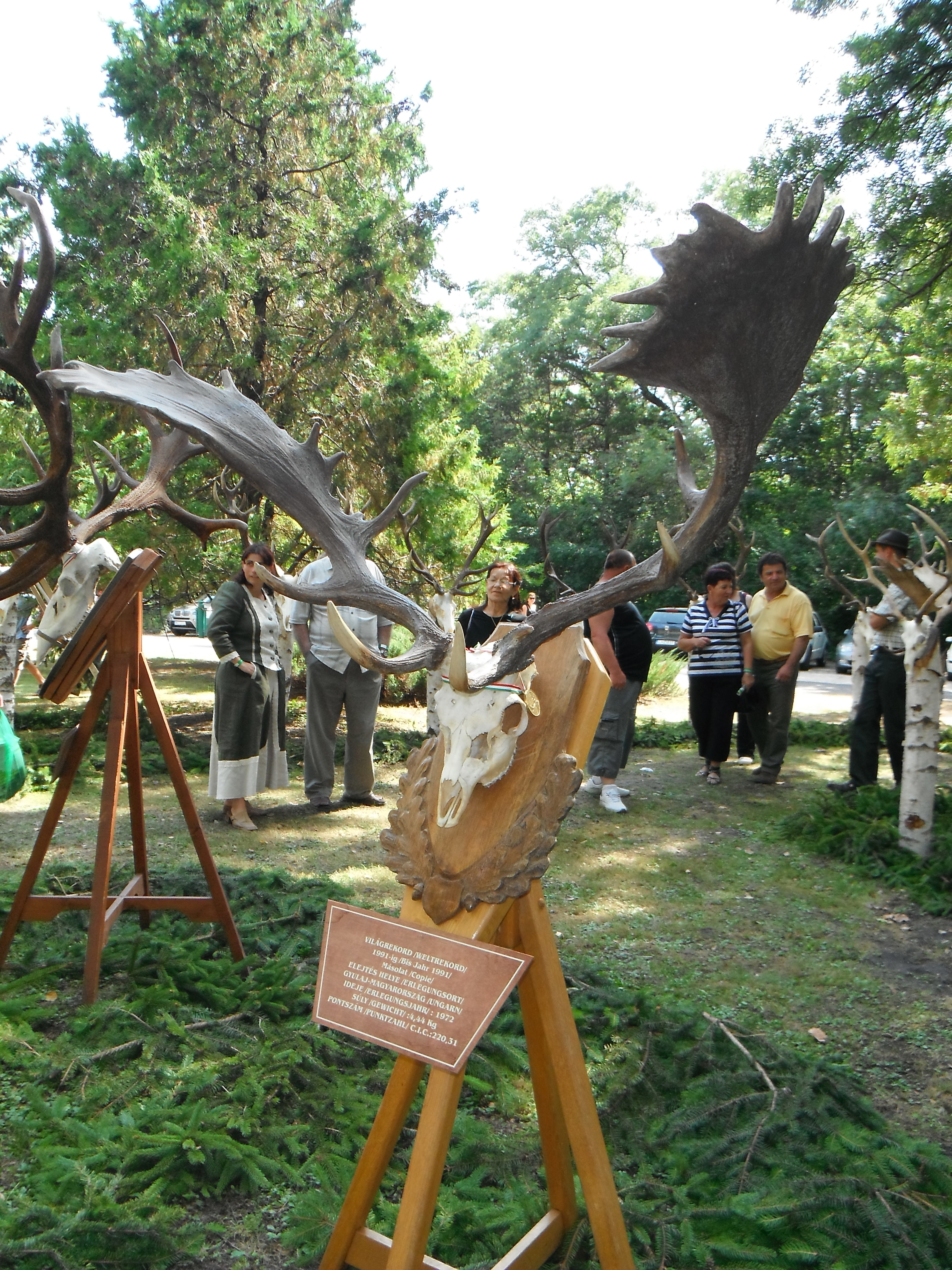 Az 1972-ben Kádár János által elejtett szarvasbika trófeája – másolat (Soponya, Fejér megye)